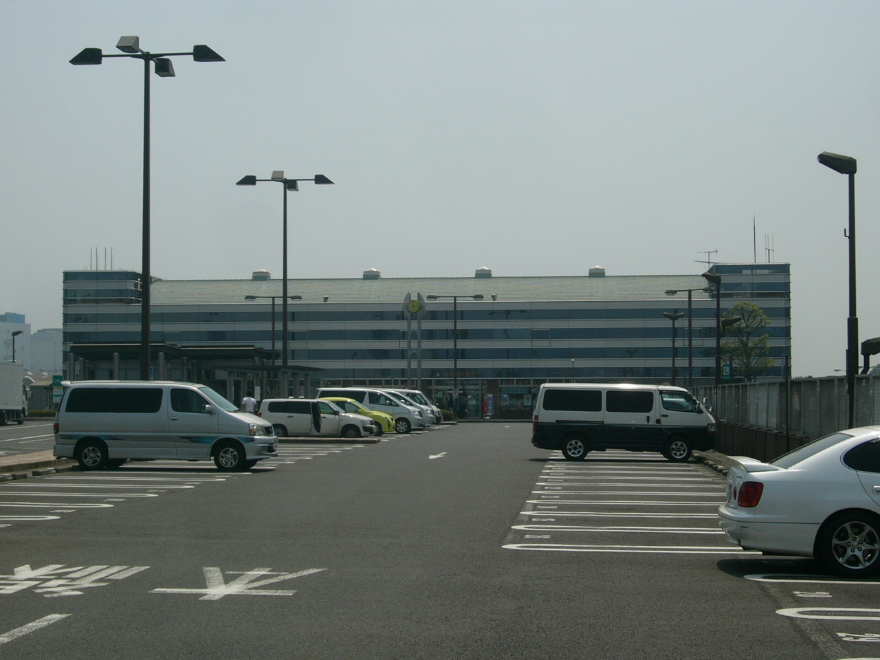 Heiwajima Parking Area (Up)